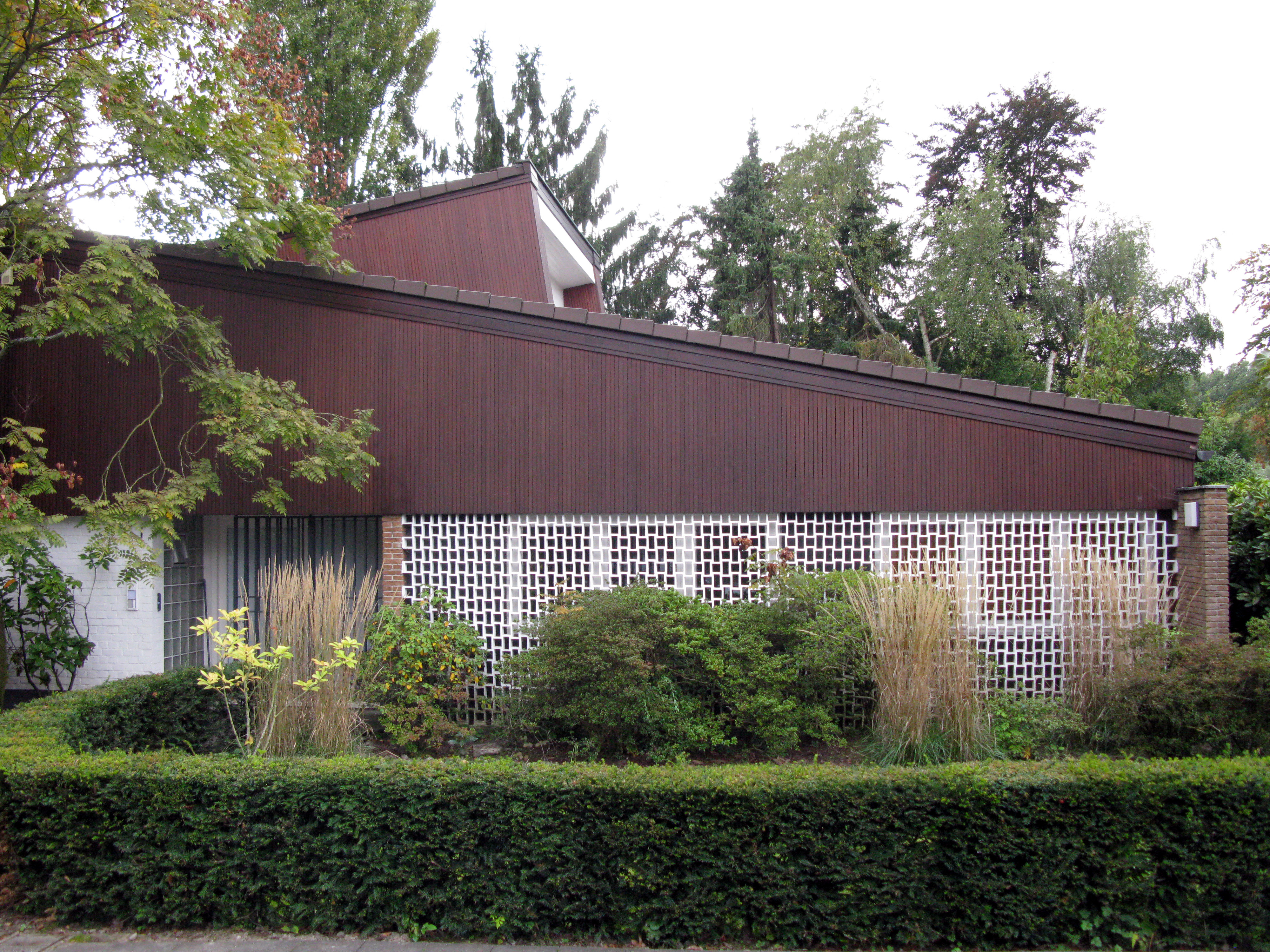 Haus Schulz in Düsseldorf-Urdenbach, 1958 nach Plänen von Joachim Neiser erbaut